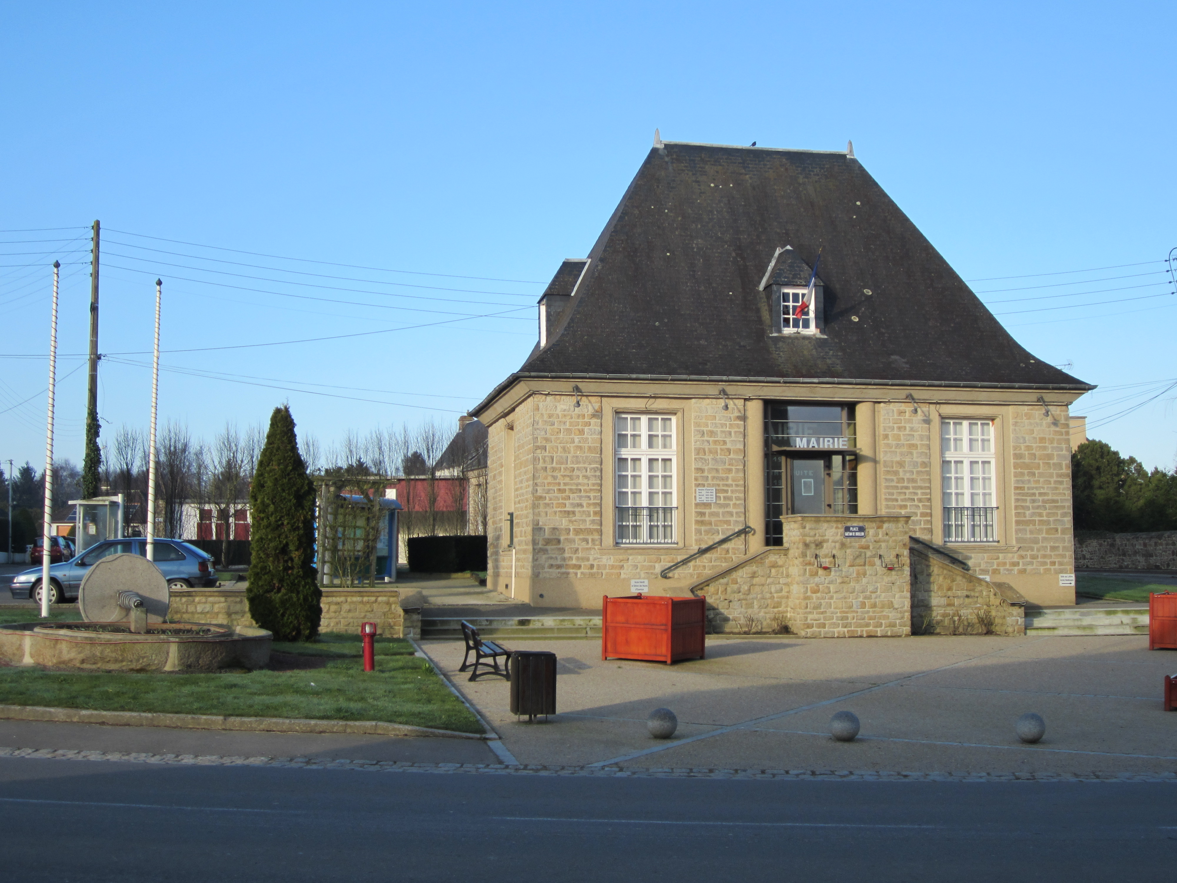 Pontaubault